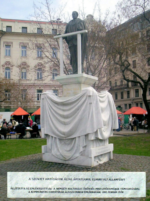 Kovács Béla szobra Budapesten, a Kossuth Lajos téren (V. kerület). Kligl Sándor szobrászművész alkotása (2002)